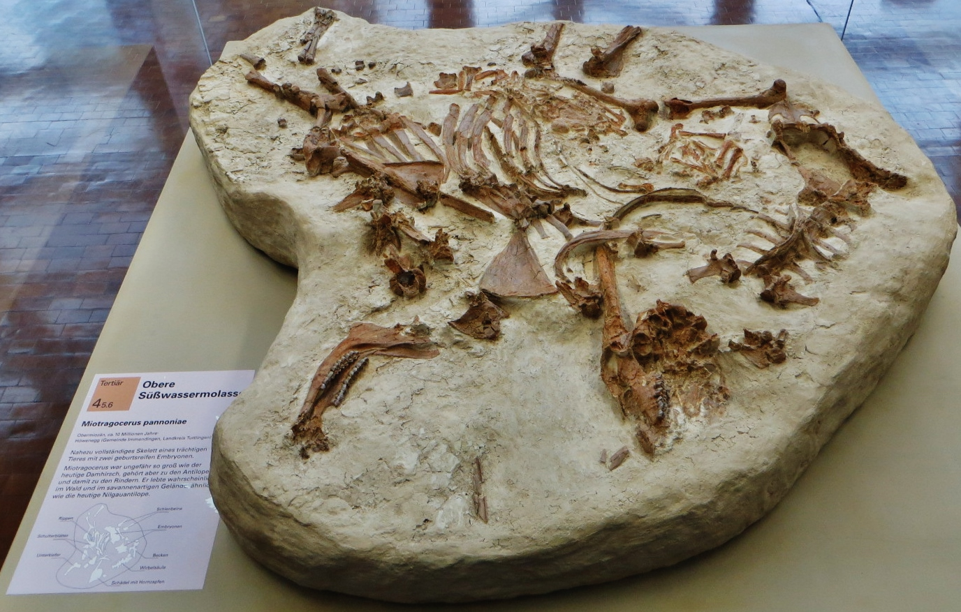 Fossil of Miotragocerus- Took the picture at Museum am Lowentor, Stuttgart